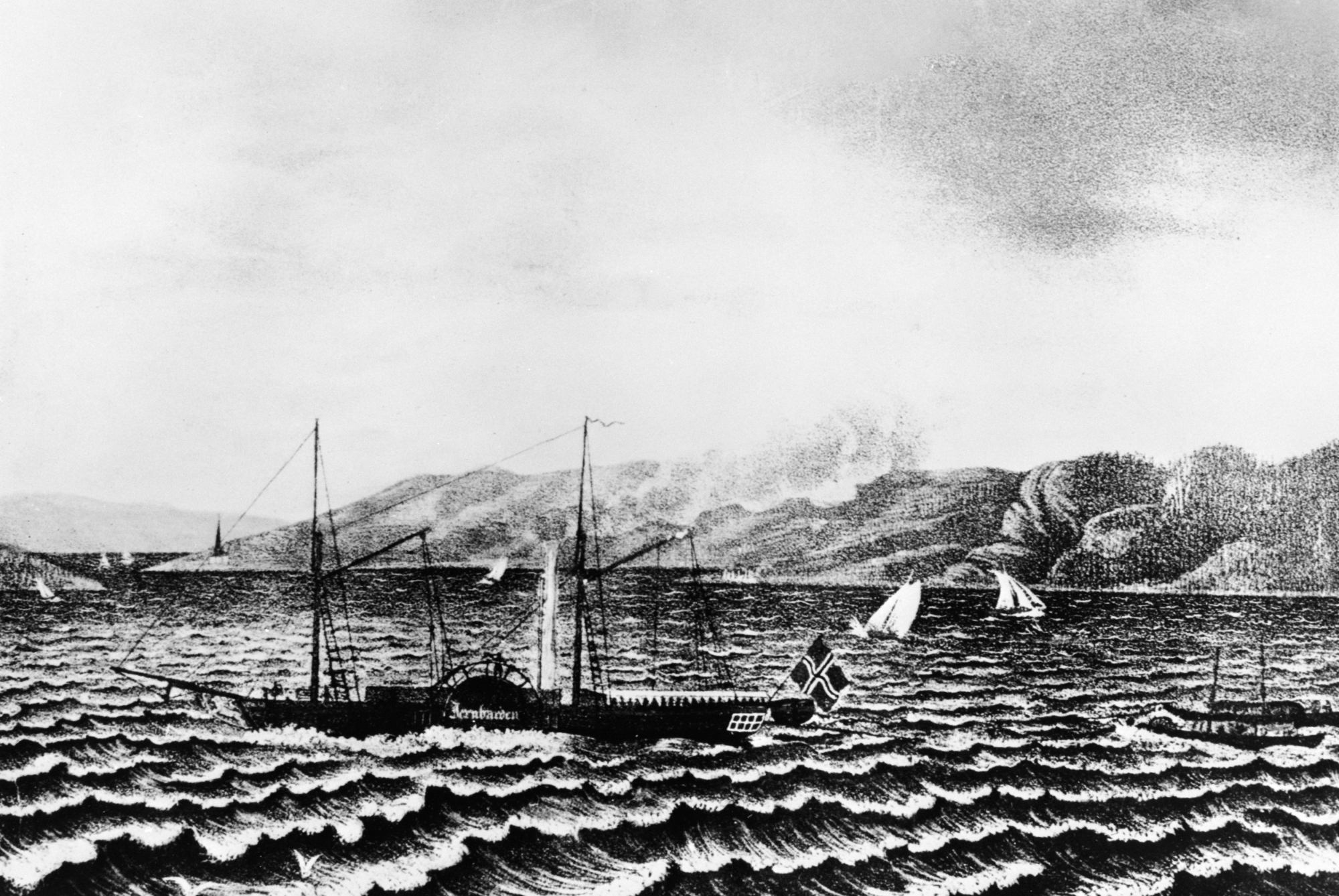 D/S Jernbarden på Mjøsa, tegning etter kobberstikk